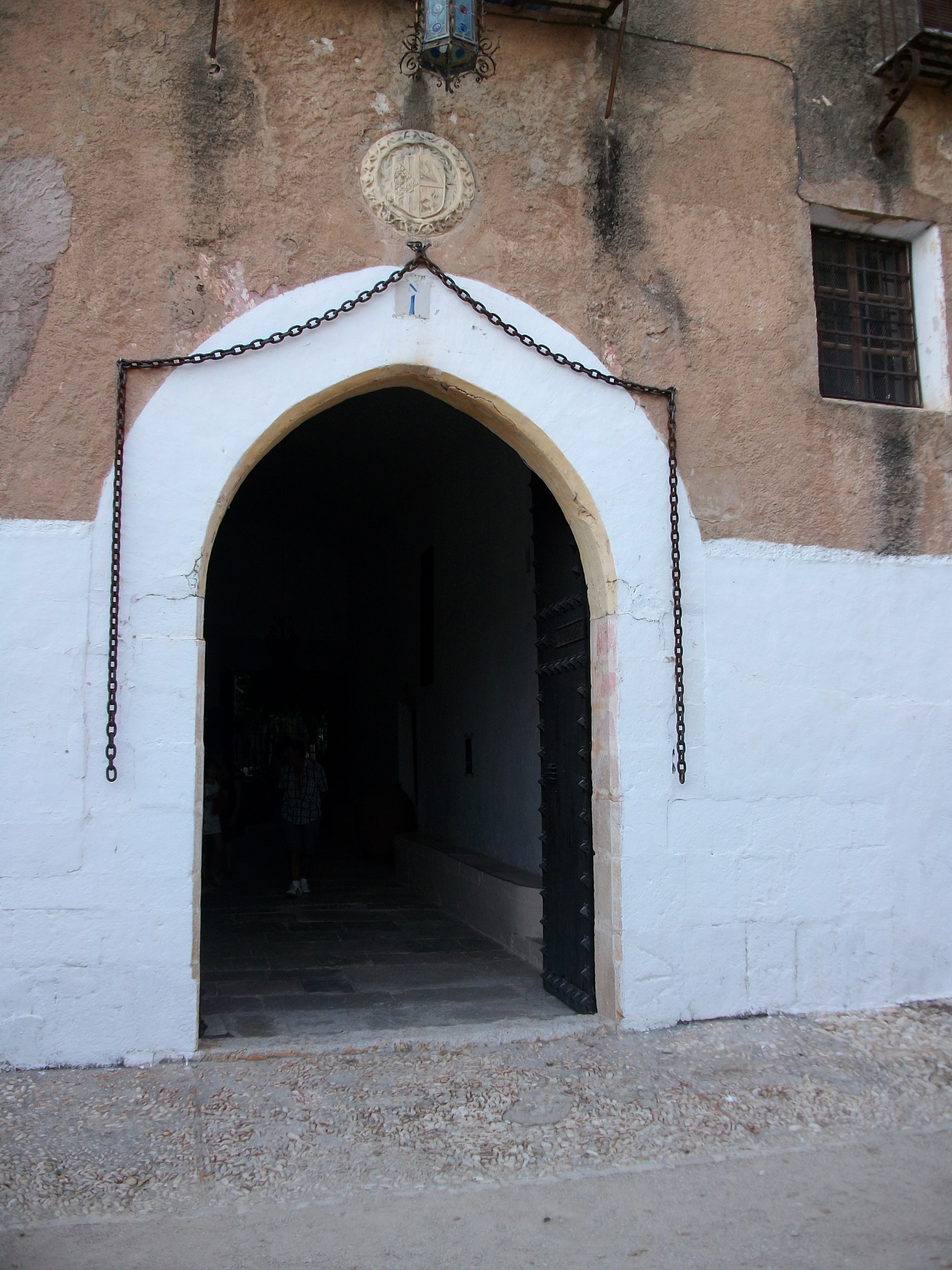 Porta d'entrada a les dependències del monestir de Sant Jeroni de Cotalba.